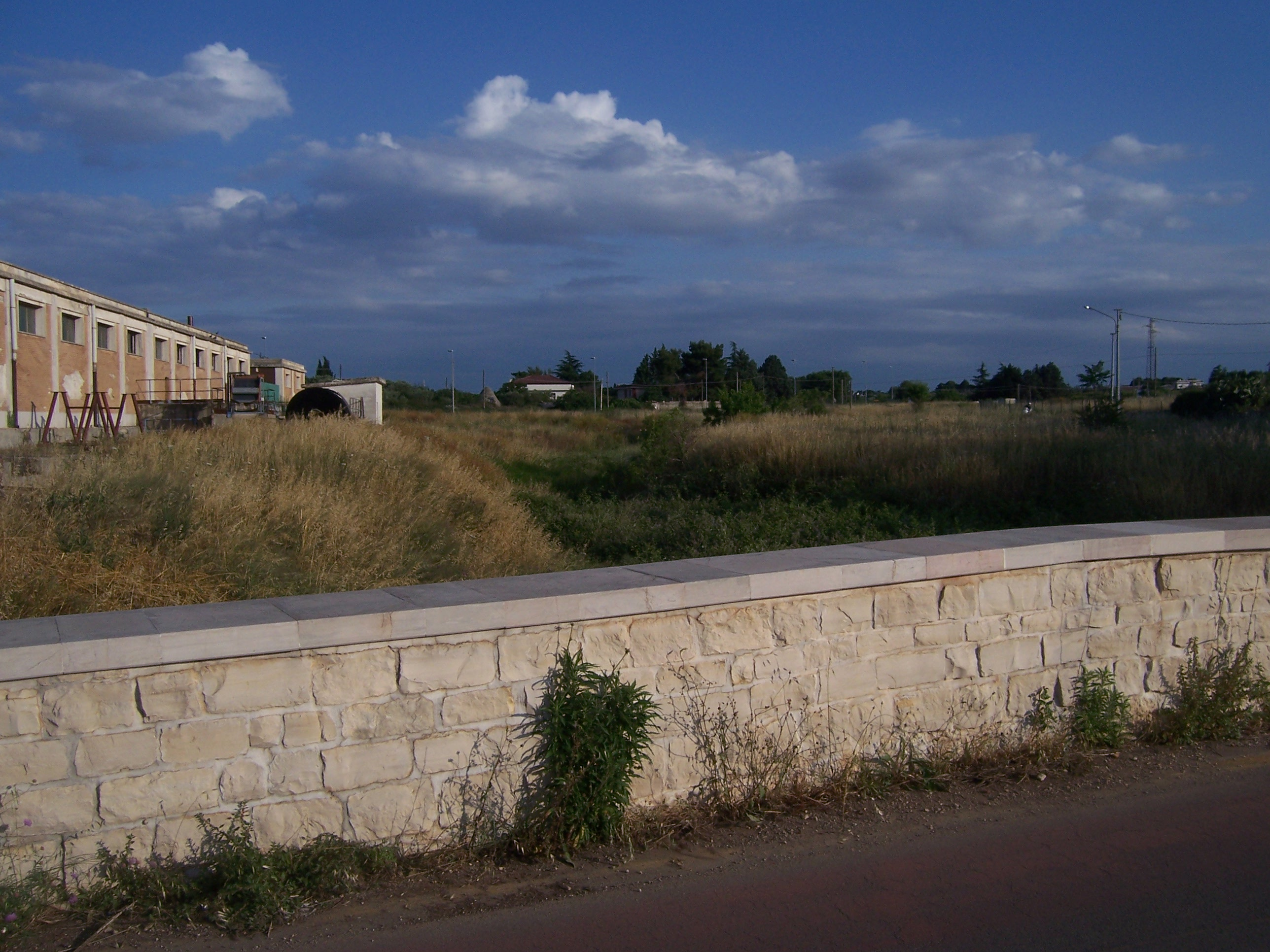 Lama Giotta a Turi